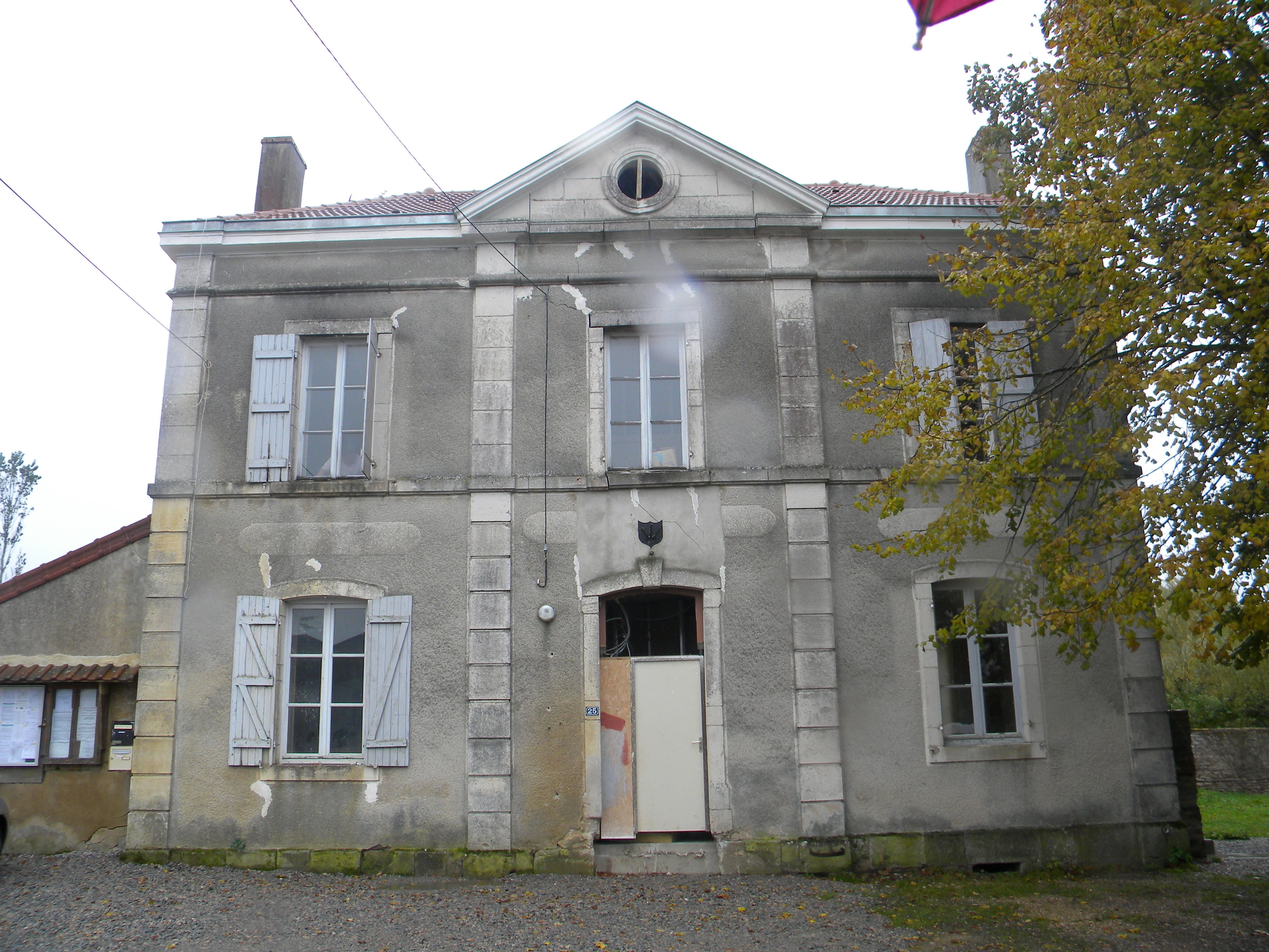 Mairie d'Aubigny-la-Ronce